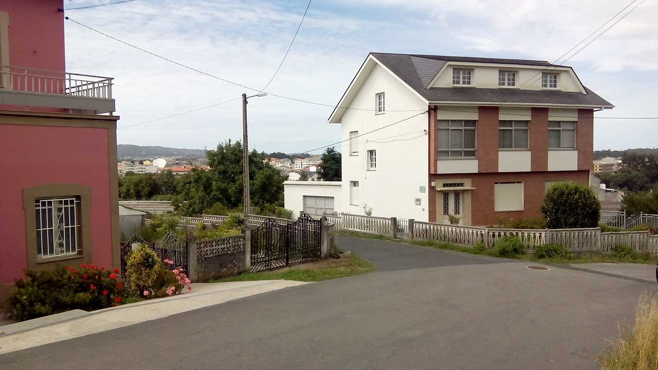 Vista da Fonte de Neixa, O Couto.